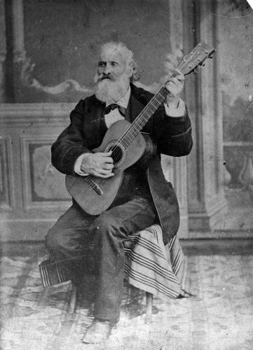 BILDUMA ETA EUSKARRIA: Zuri-beltzeko argazkia, negatiboa beirazko plakan.